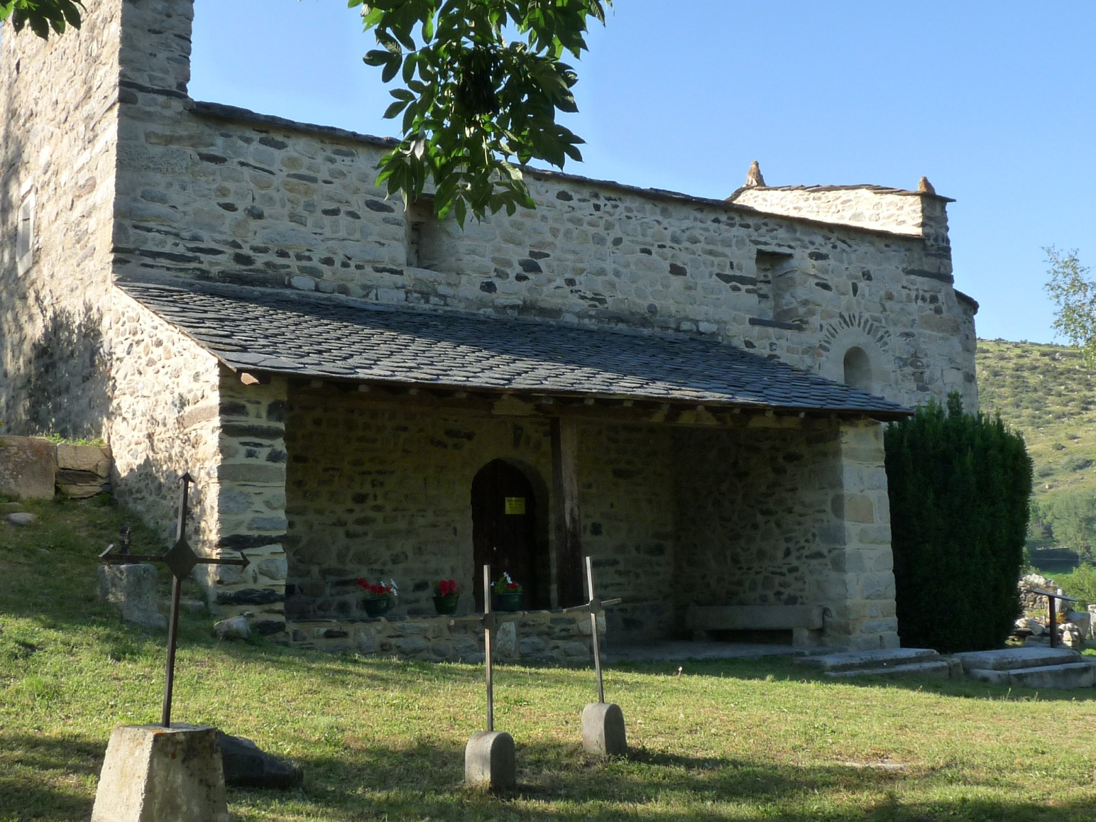 Chapelle d'Iravals, Latour-de-Carol, Pyrénées-Orientales, France